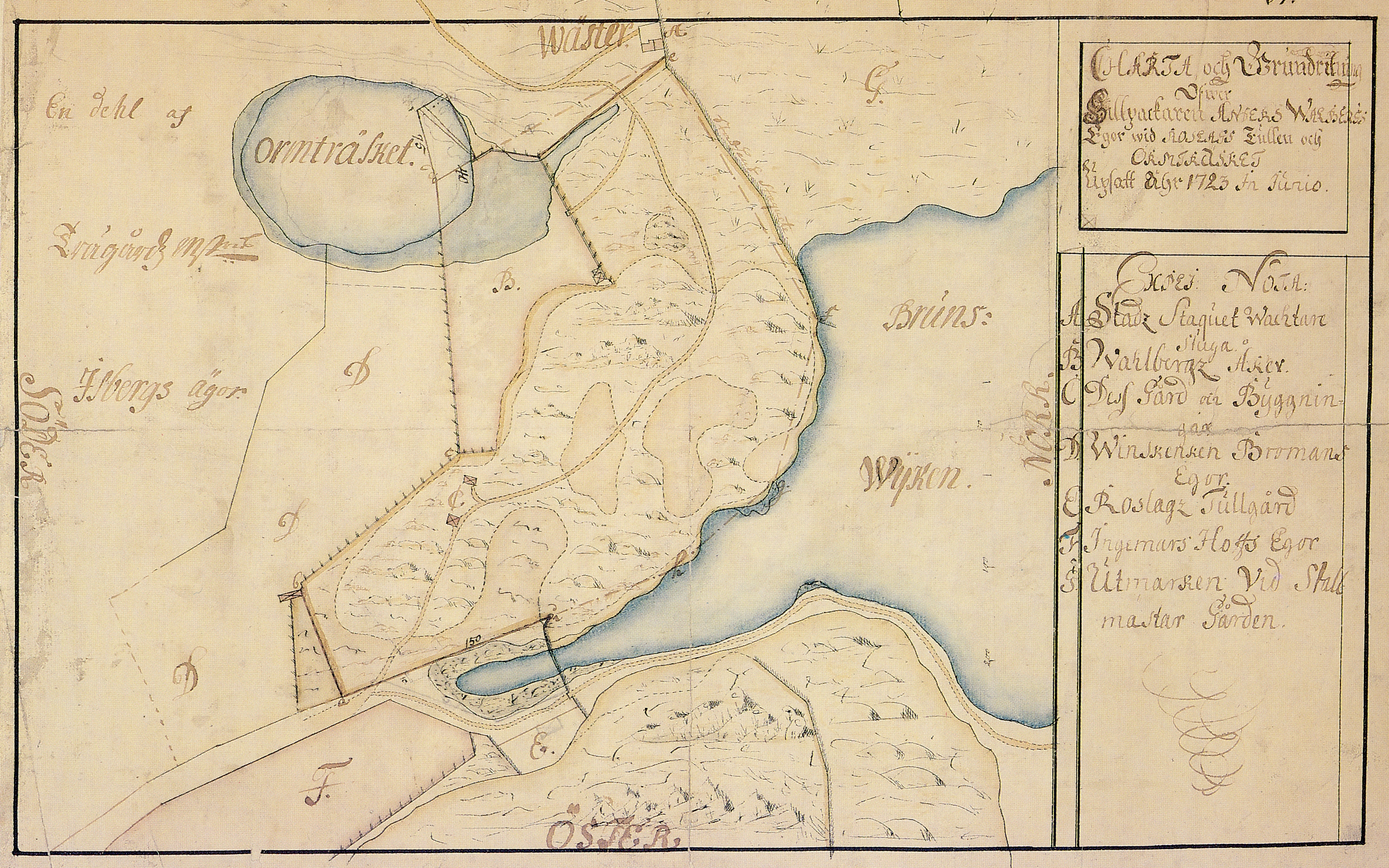 Karta över Ormträsket och sillpackaren Anders Wahlbergs ägor vid Roslags tull från 1723 (norr är till höger)